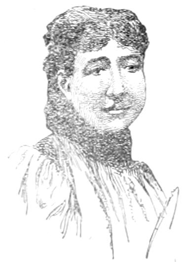 Arvede Barine, pseudonyme de Louise Cécile Bouffé.